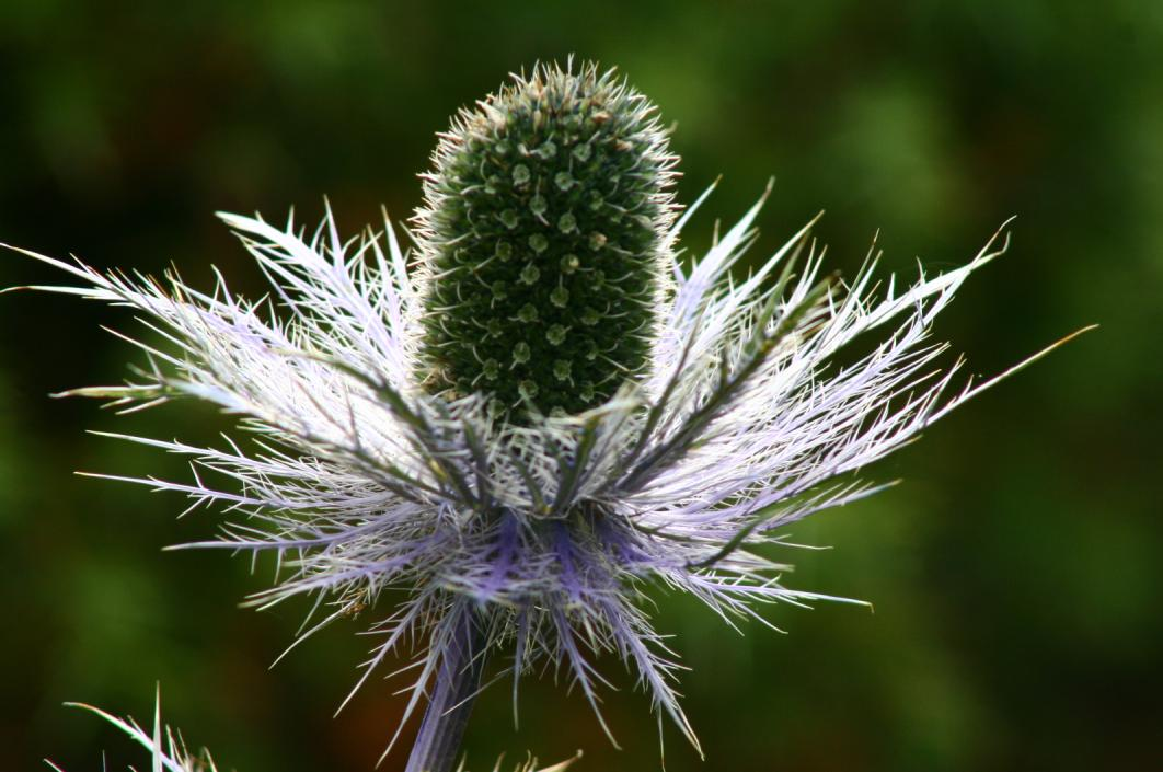 Eryngium alpinum